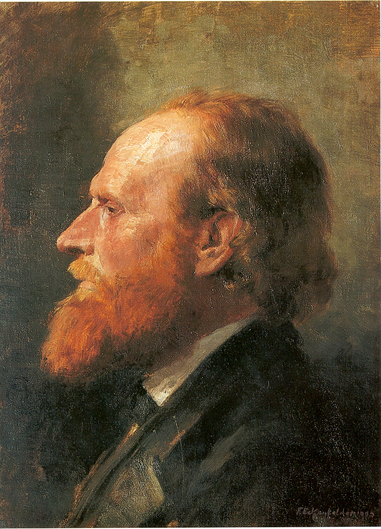 Albert Kapis Öl/Leinwand/Pappe Eckenfelder Galerie, Balingen 43*32 cm